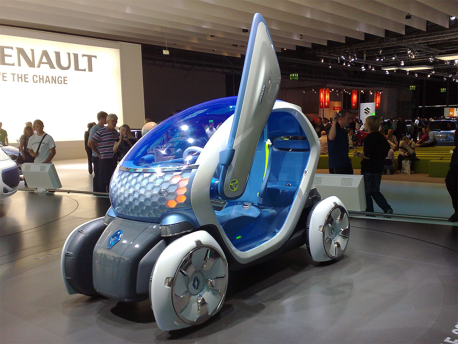 Renault Twizy Z.E. Concept auf der IAA 2009